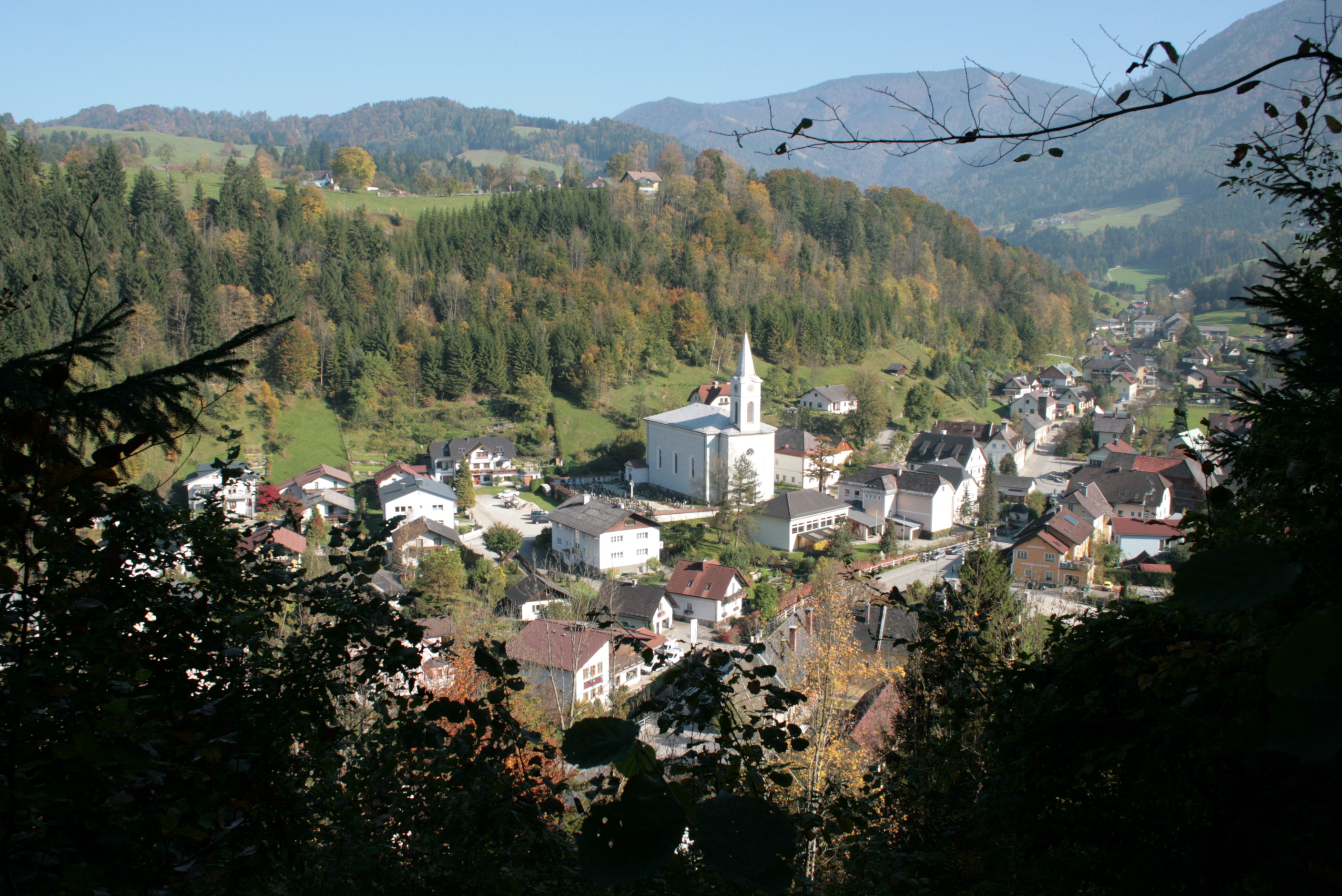 Opponitz, Niederösterreich, Österreich/Austria